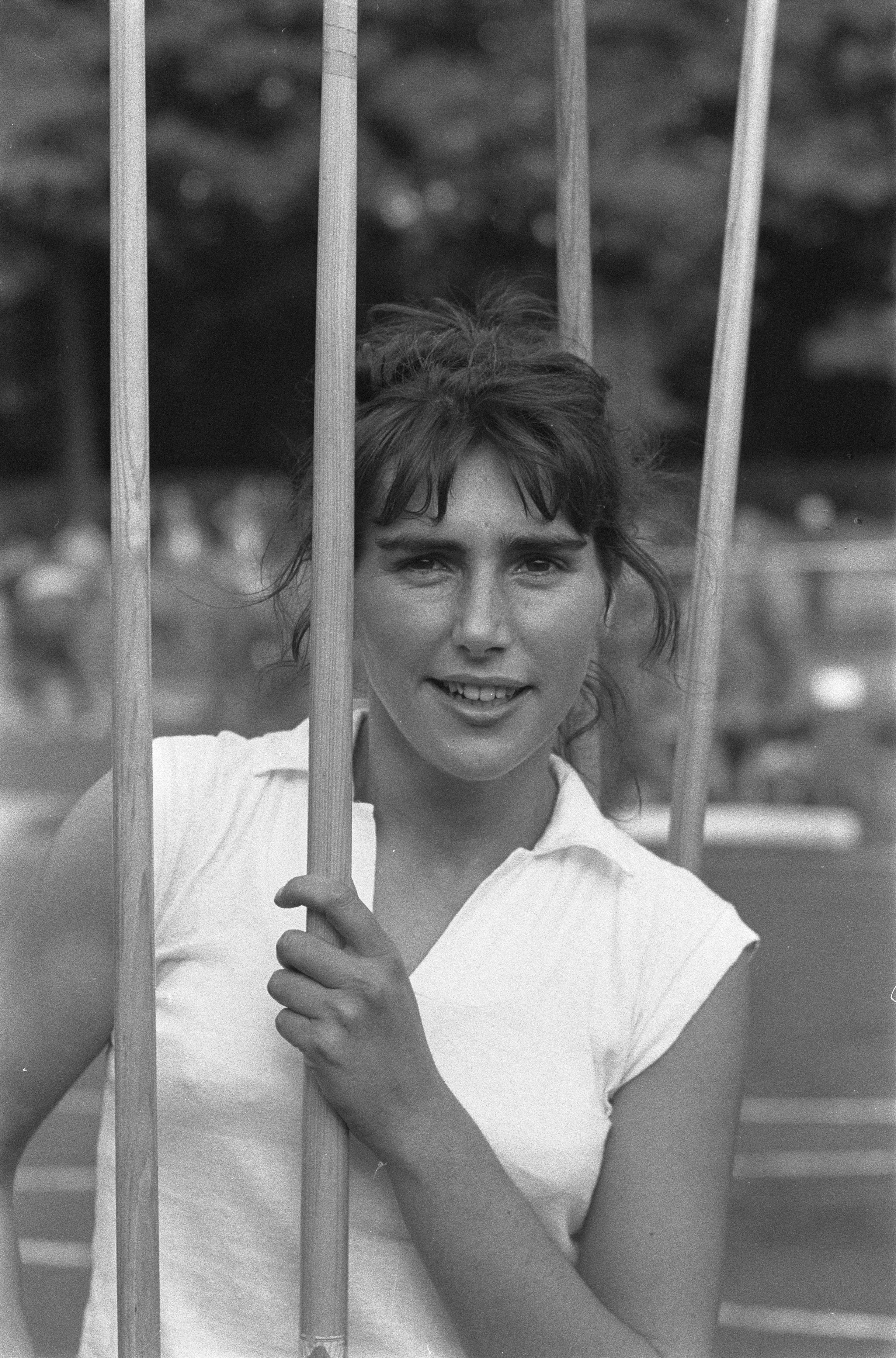 Collectie / Archief : Fotocollectie Anefo Reportage / Serie : [ onbekend ] Beschrijving : Atletiek dames Duitsland Nederland te Aken, Willy van Montfoort die het Nederlands record speerwerpen verbeterde Datum : 27 september 1959 Locatie : Aken Trefwoorden : atletiek, portretten, speerwerpen, sport, vrouwen Persoonsnaam : Montfoort Willy van Fotograaf : Pot, Harry / Anefo Auteursrechthebbende : Nationaal Archief Materiaalsoort : Negatief (zwart/wit) Nummer archiefinventaris : bekijk toegang 2.24.01.05 Bestanddeelnummer : 910-7051